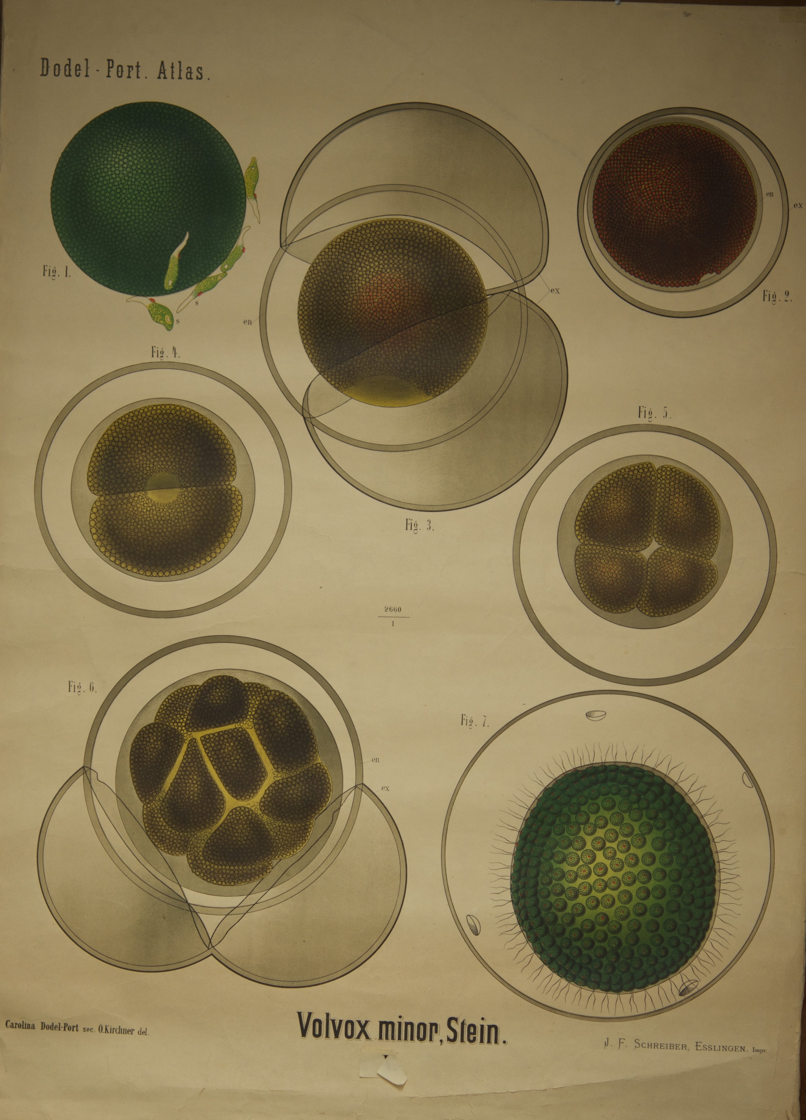 Planche d'illustration de l'Atlas de Botanique d'Arnold Dodel-Port de l'espèce Volvox minor (Stein.)